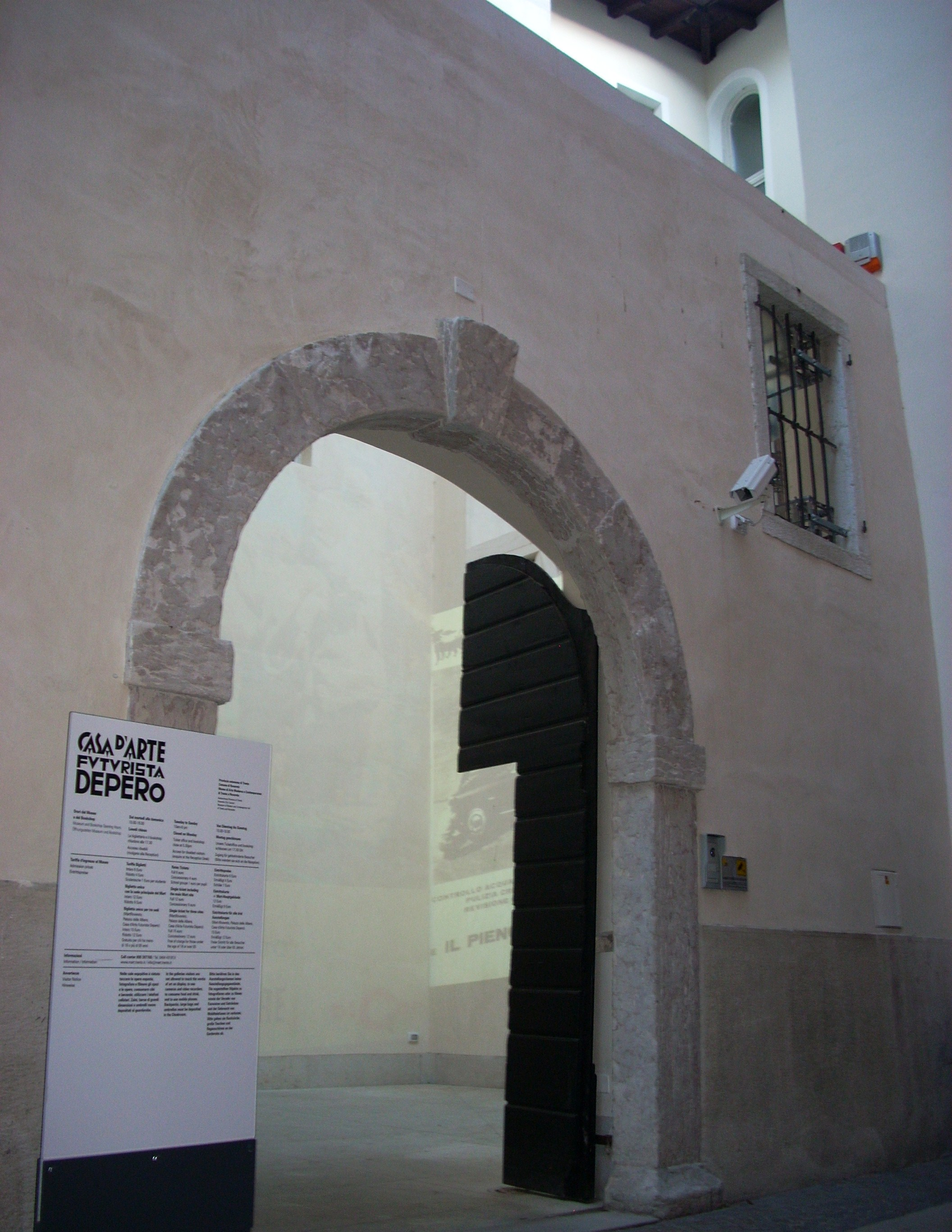 Casa Depero, ingresso